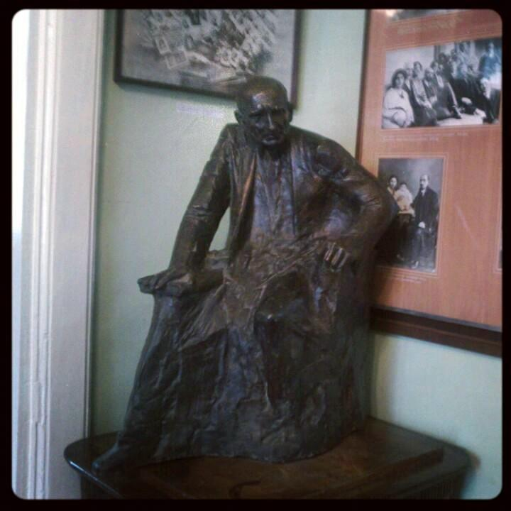 Դերենիկ Դեմիրճյանի տուն-թանգարան